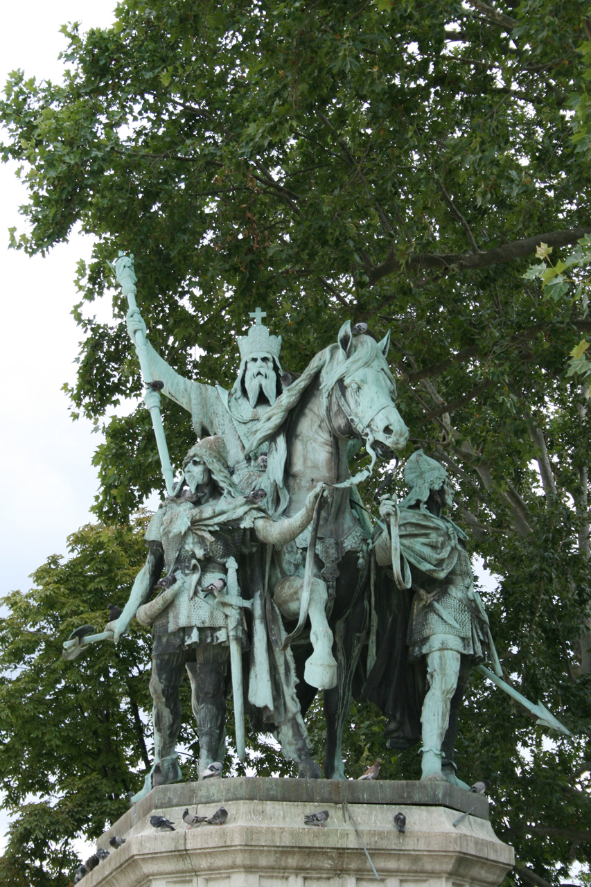 Statue de Charlemagne et ses Leudes à Paris